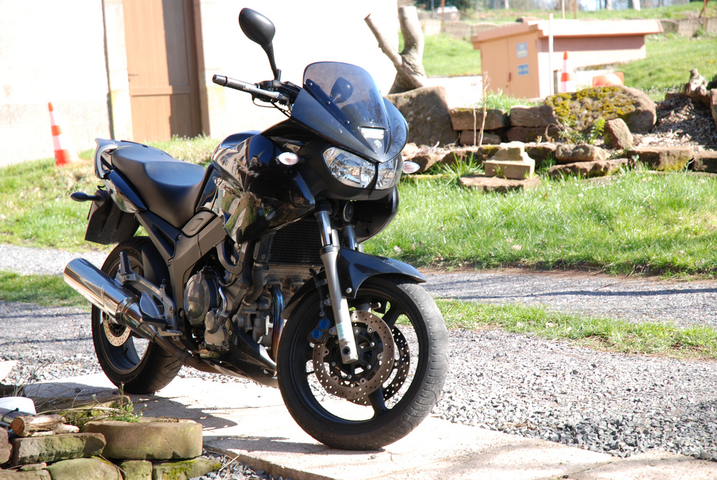 Yamaha TDM 900